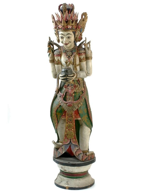 Beeld. Shiva is als Batara Guru in het bezit van de hoogste wijsheid en daardoor de leider en goddelijke leraar van het mensdom. Zo hoog is zijn aanzien, dat hij veelal onder de naam Batara Guru als opperwezen, als hoogste god, wordt aangeduid. Zijn attributen: bidsnoer, drietand, vliegenwaaier en waterkruik, zijn versierselen: kastekoord (upavita), halsketting, oorhanger, bovenarmbanden en polsringen. Meestal wordt hij voorgesteld als een bejaarde, zwaarlijvige man in staande houding, knevel en spitse baard dragend en met slechts twee armen. Het beeld stelt hem voor met witte kleur en vier handen, waarvan twee een waterkruik vasthouden. Dit beeld behoort tot een groep van 28 beelden (15-156 t/m 15-182b), gezamenlijk een pantheon van Balinese godheden vormend, dat getoond werd op de Nederlandse koloniale afdeling op de wereldtentoonstelling te Parijs in 1900. Speciaal voor deze tentoonstelling heeft C.M. Pleyte, conservator van 's Rijks Etnografisch Museum in Leiden, deze beelden op Bali laten vervaardigen. Met behulp van enkele priesters selecteerde hij de relevante beelden die vervolgens door Balinese houtsnijders werden nagemaakt.. Houten beeld van god Batara Guru Unknown language: Wooden statue of the god Batara Guru